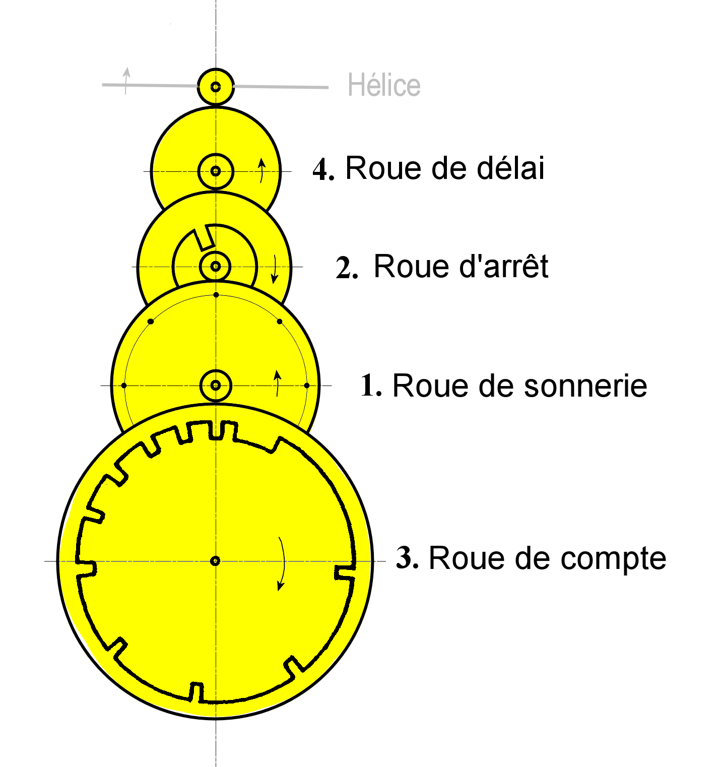 Train de sonnerie d'une horloge sonnante à roue de compte.